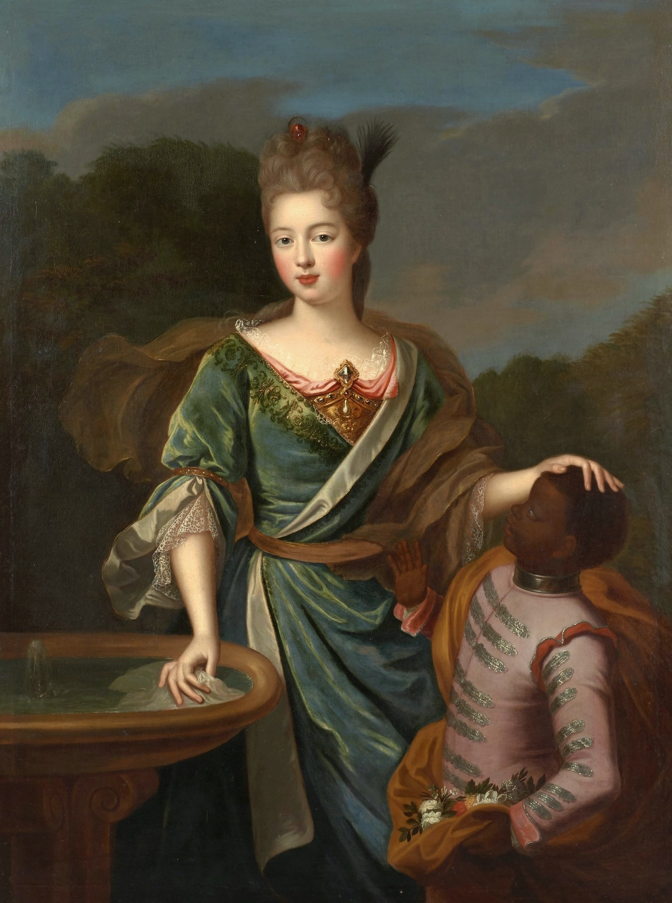 Portrait de Françoise Marie de Bourbon (1677-1749), Mademoiselle de Blois, avec son page